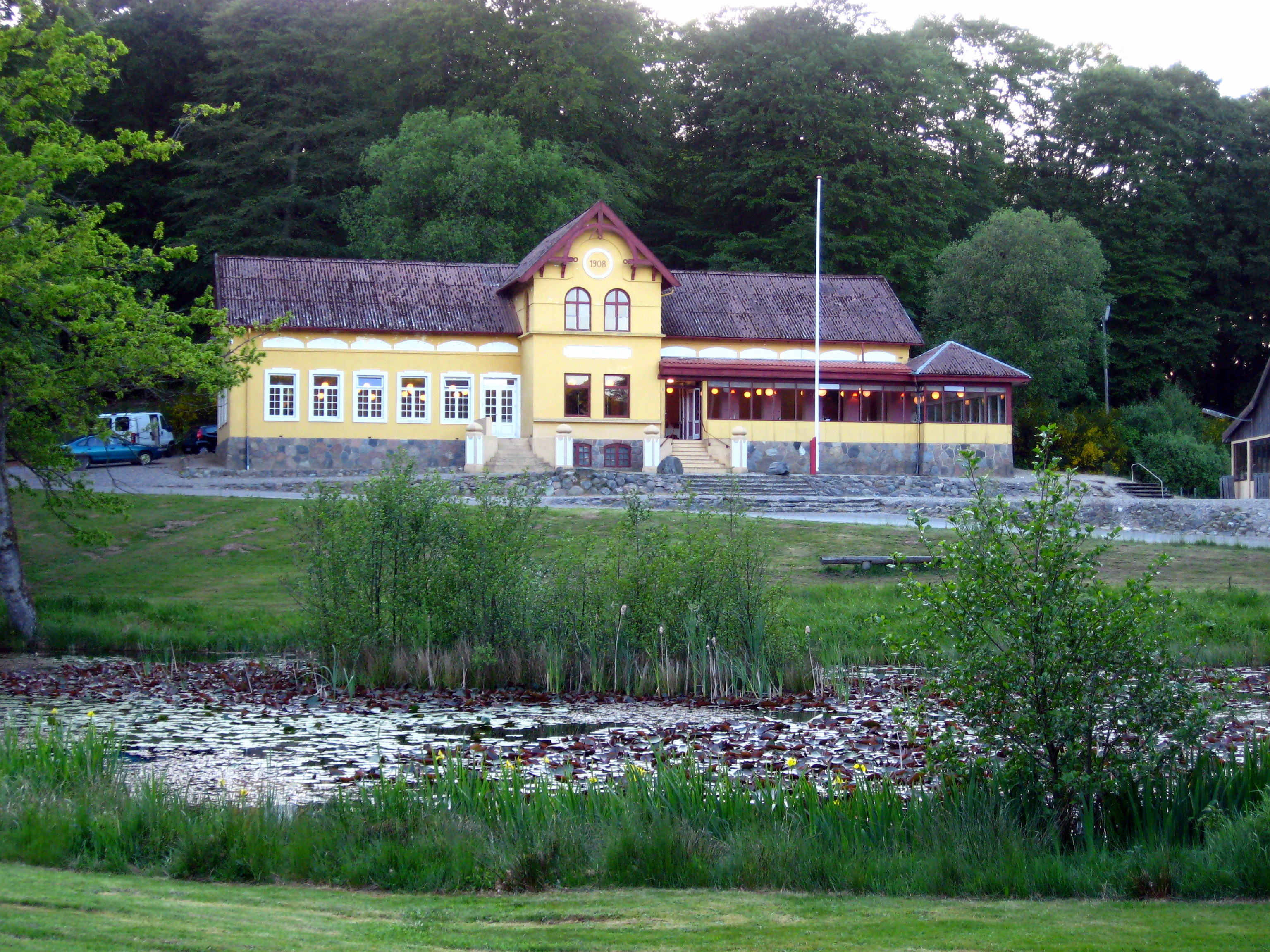 Tolne Skov, 2009